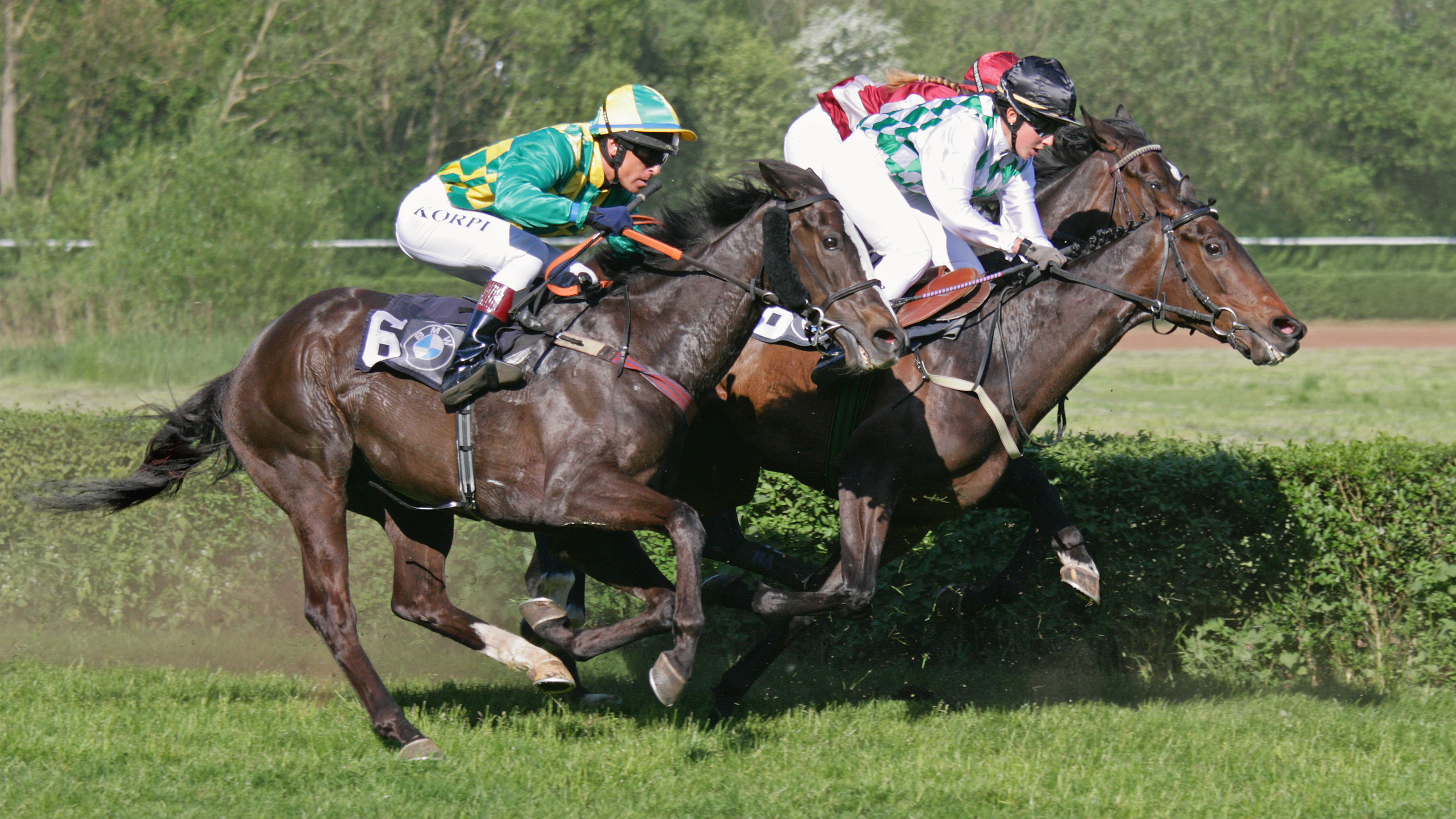 Galopprennen in Saarbrücken-Güdingen